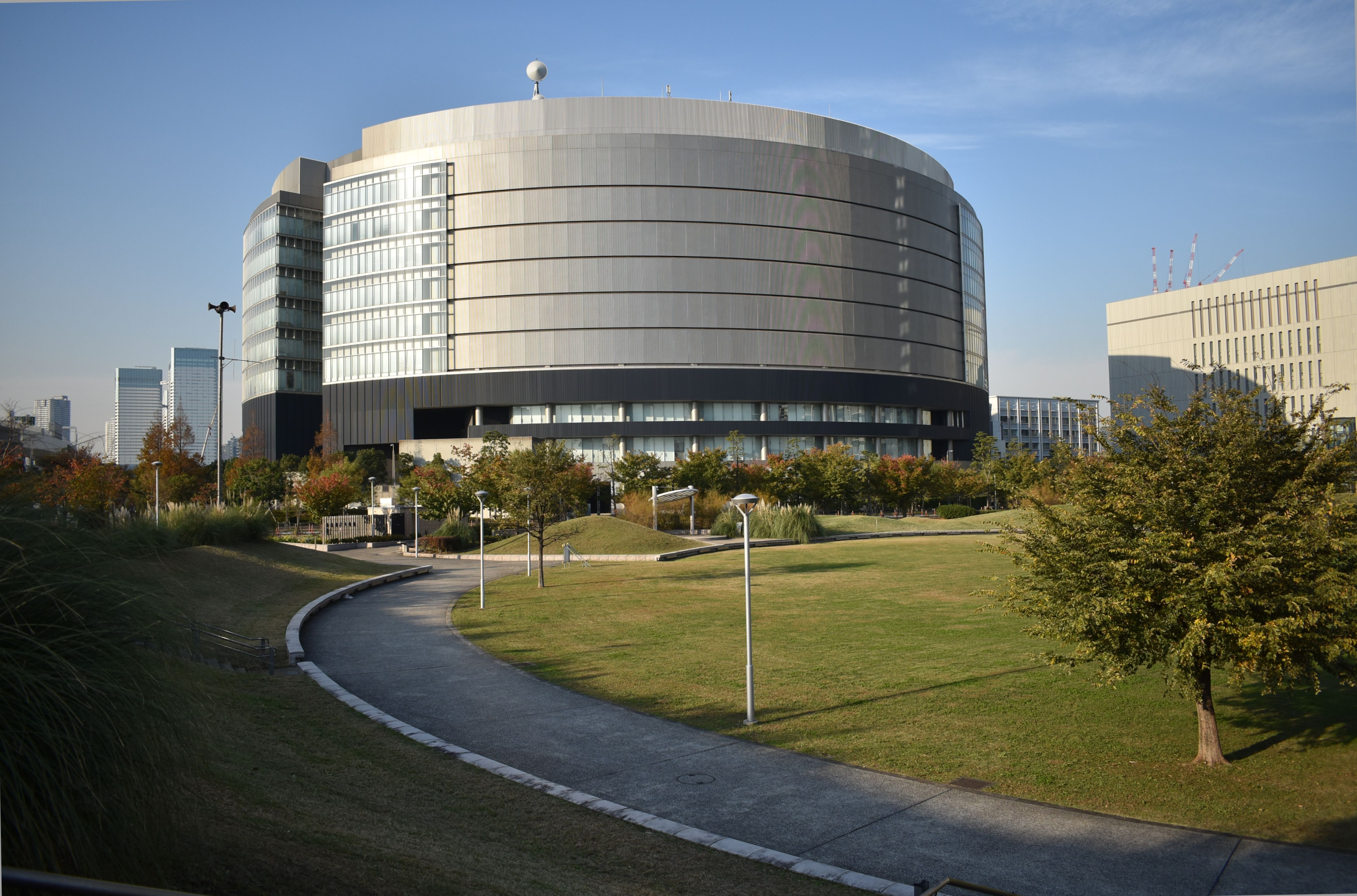 東京電力有明変電所